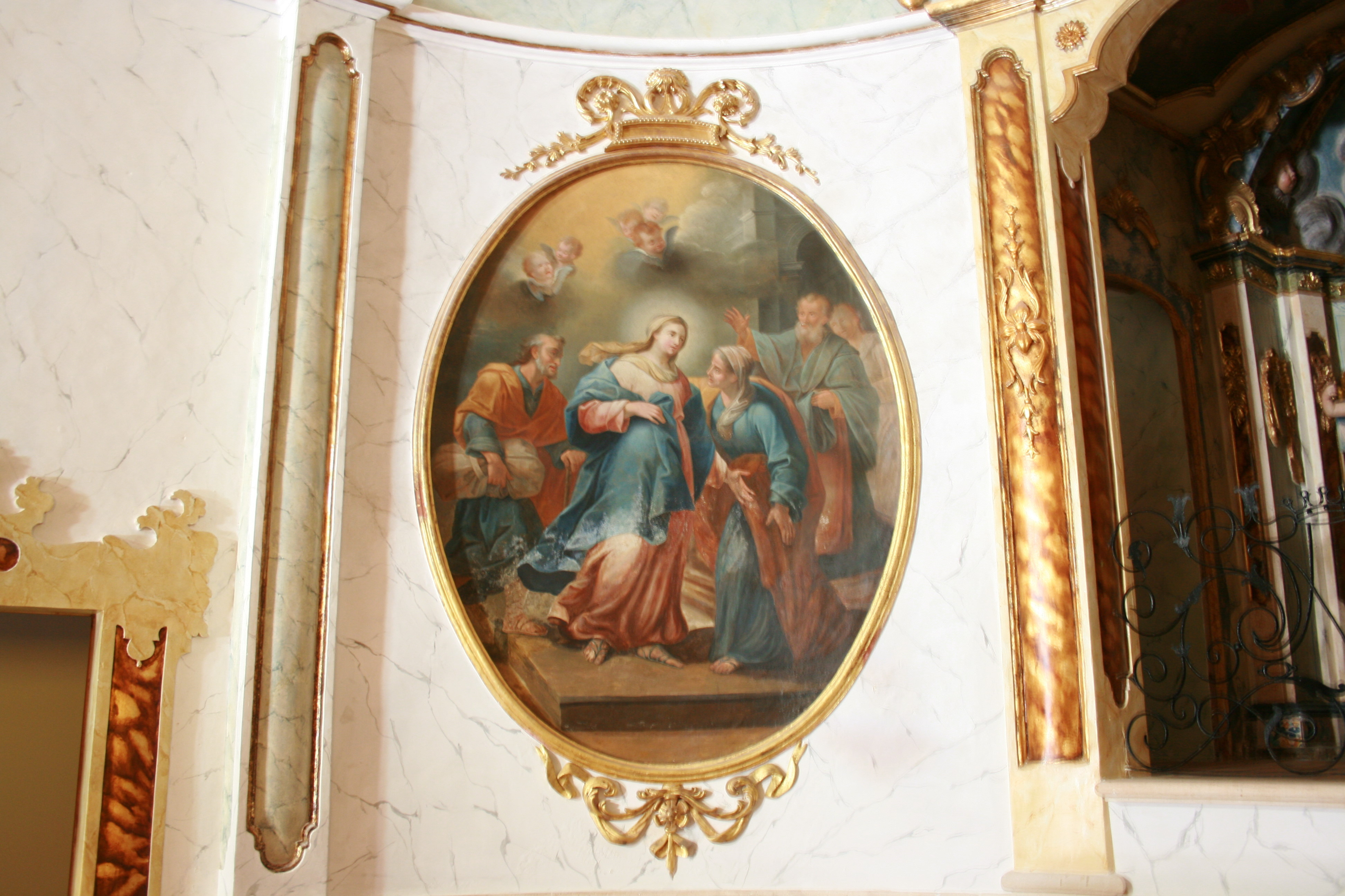 Santuari de Nostra Senyora de Gràcia, Puig de Randa in Algaida, Mallorca